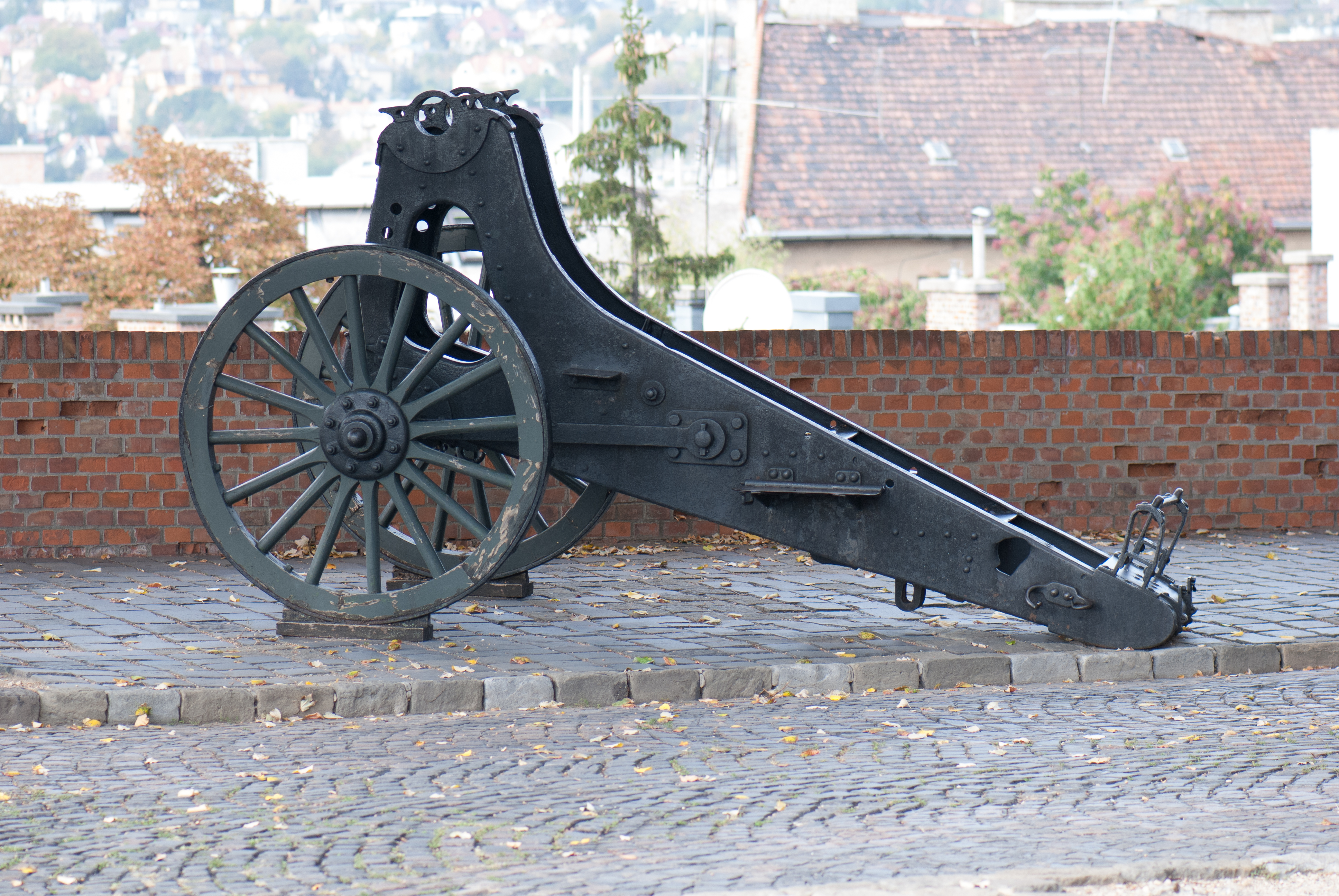 Budapest 2012